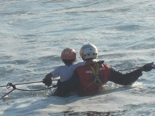 Defensa Civil Chile